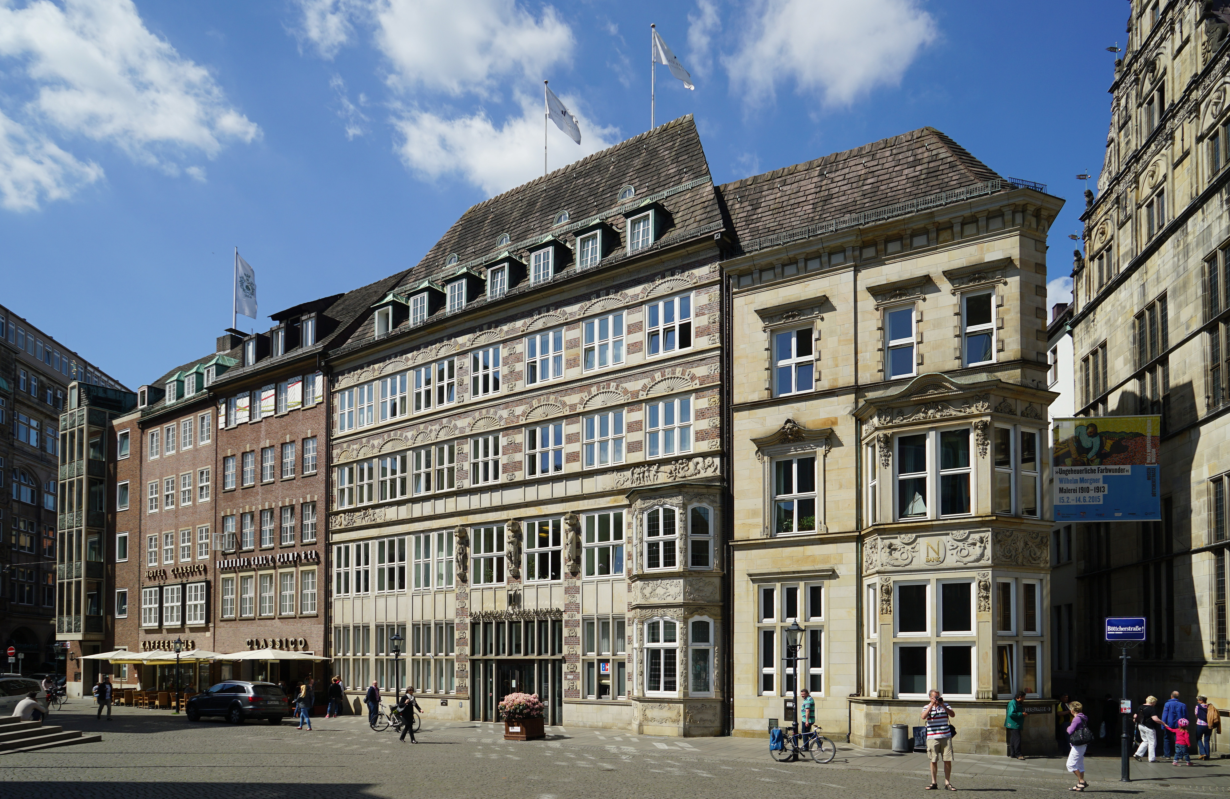 Bankhaus Neelmeyer, Wilckens'sches Haus, Bremische Hypothekenbank, Patzenhofer am Markt, Zum Roland in Bremen, Am Markt 14Das abgebildete Objekt ist ein geschütztes Kulturdenkmal in der Freien Hansestadt Bremen, mit der Nr. 0073 beim Landesamt für Denkmalpflege registriert.